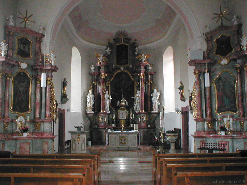 Innenraum der kath. Kirche in Billigheim-Allfeld